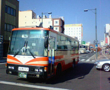 弘南バス 元:弘南サービス路線塗装（日野・レインボーRJ観光型・P-RJ170BA） 弘前市「上土手町」バス停付近にて